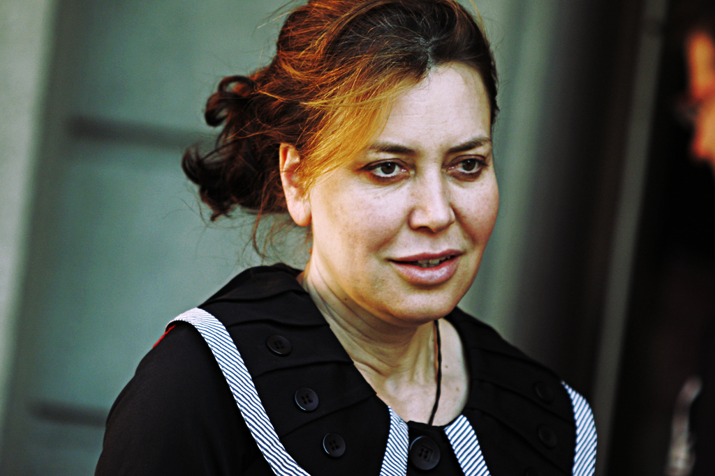 l'attrice Sabina Guzzanti presenzia al conferimento del Premio Chiara alla Carriera 2011 a Franca Valeri al Teatro Sociale di Luino l'8 maggio 2011